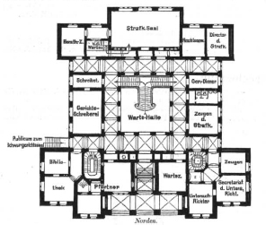 Bochumn, Landgericht, Erdgeschoss